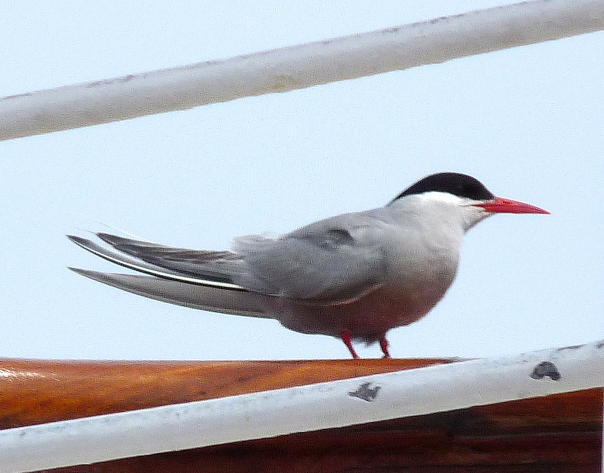 Sterna vittata, Tristan da Cunha